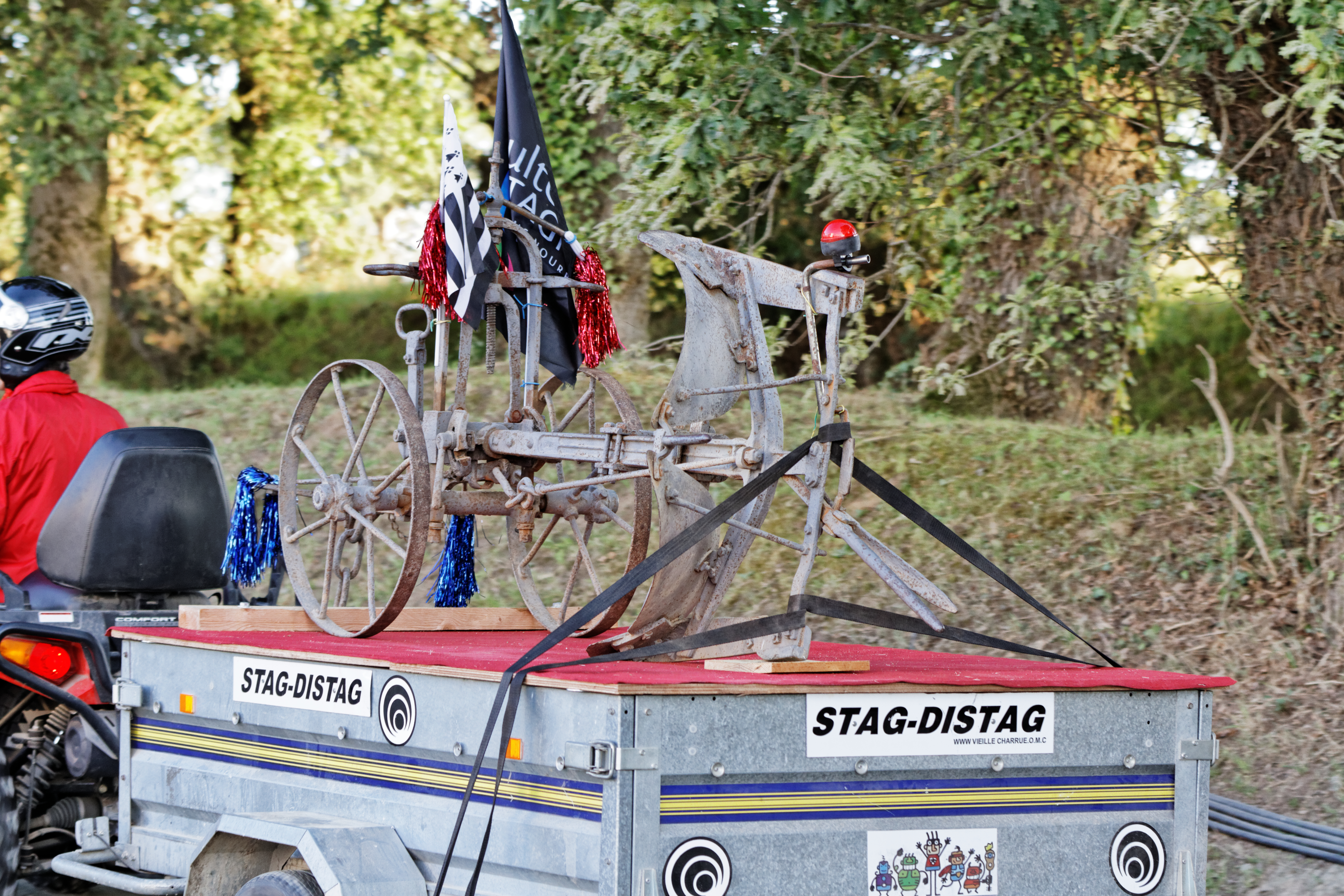 Le festival des Vieilles Charrues 2014.